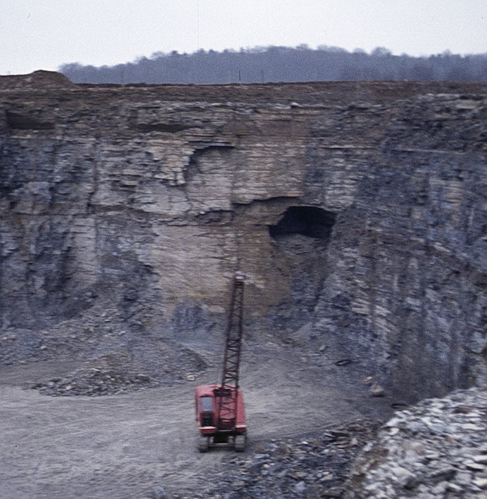 Eberstadter Tropfsteinhöhle: Höhleneingang kurz nach der Entdeckung im Dezember 1971